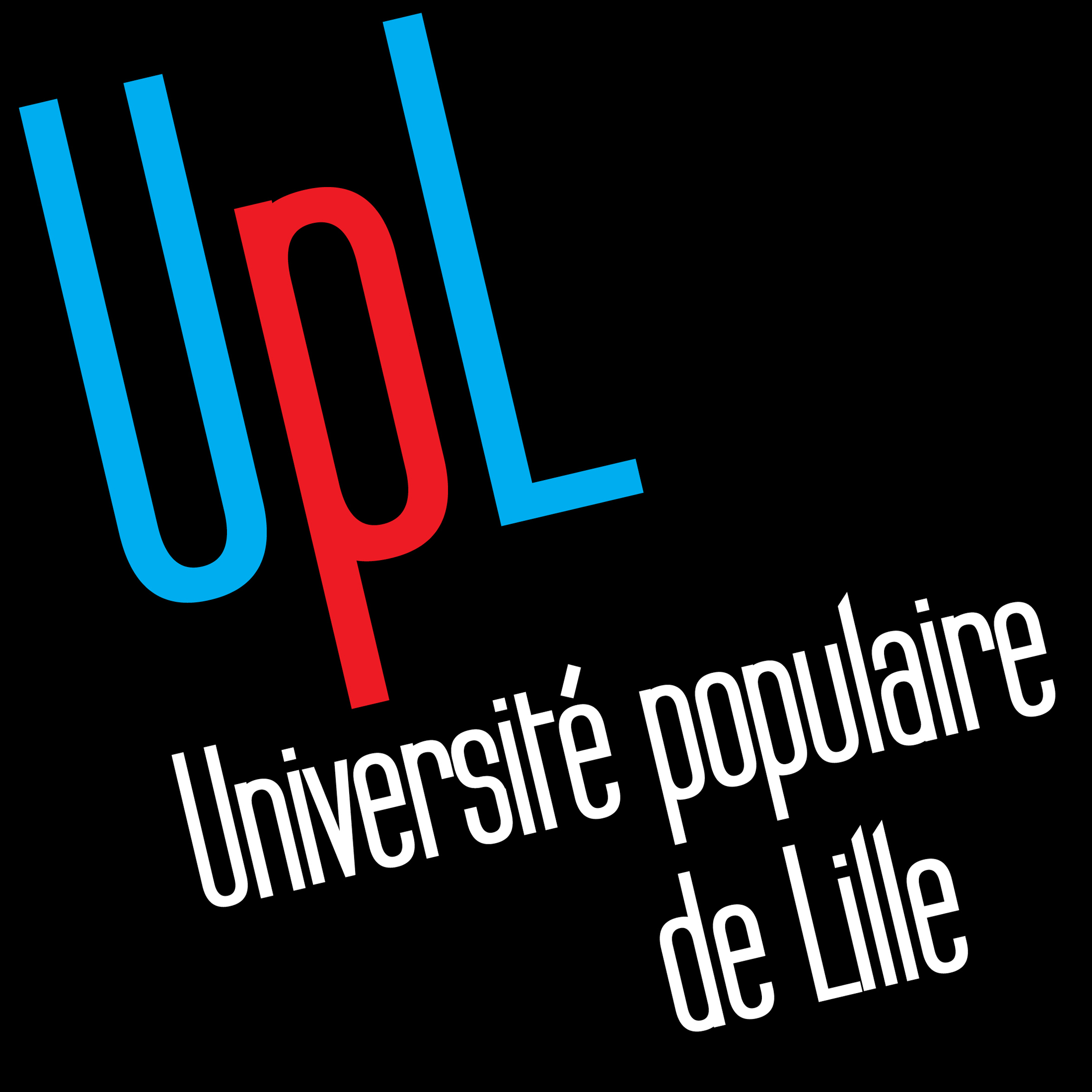 Logo de l'Université populaire de Lille